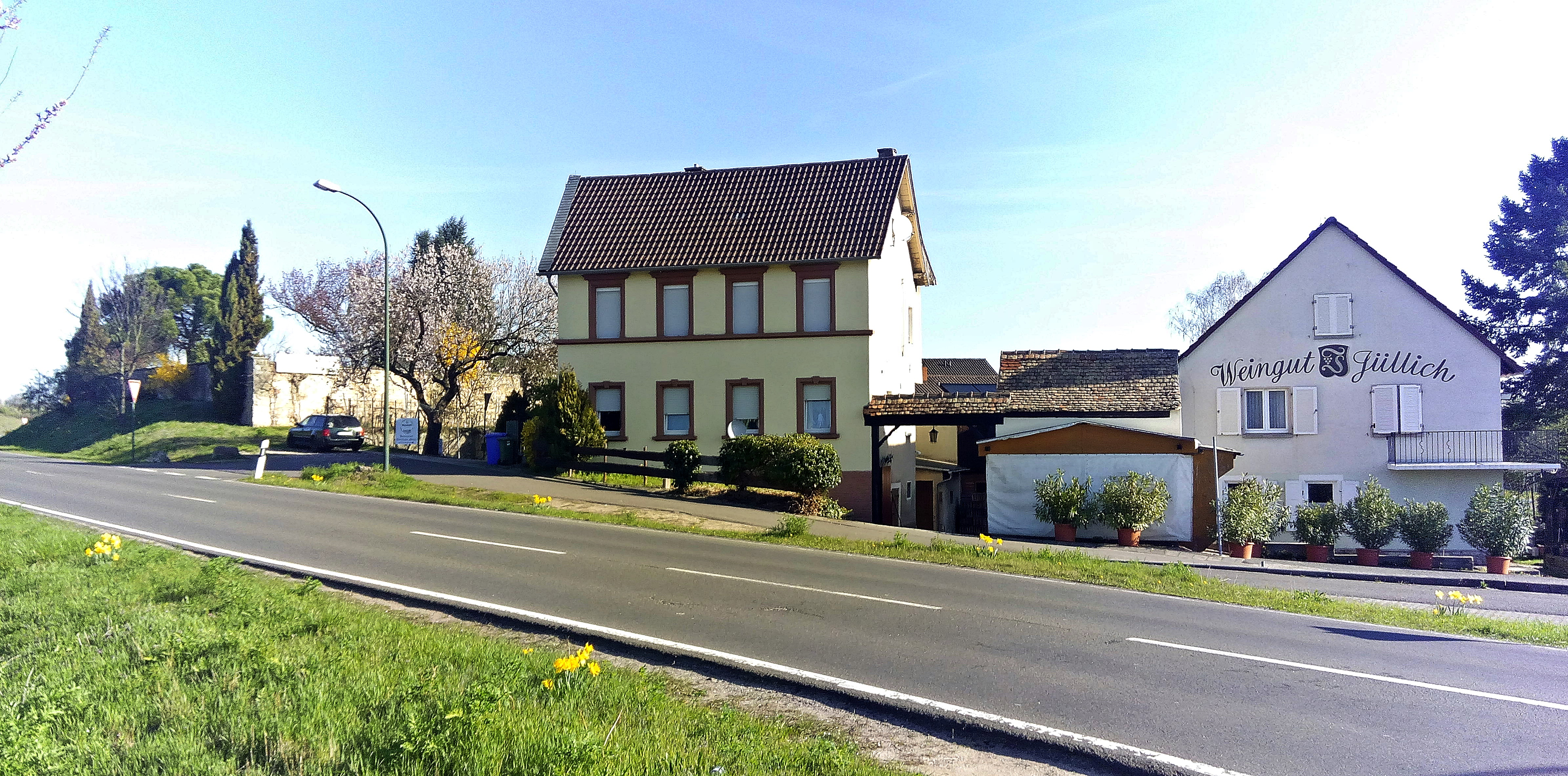 Pfeffingen von der Landstraße aus